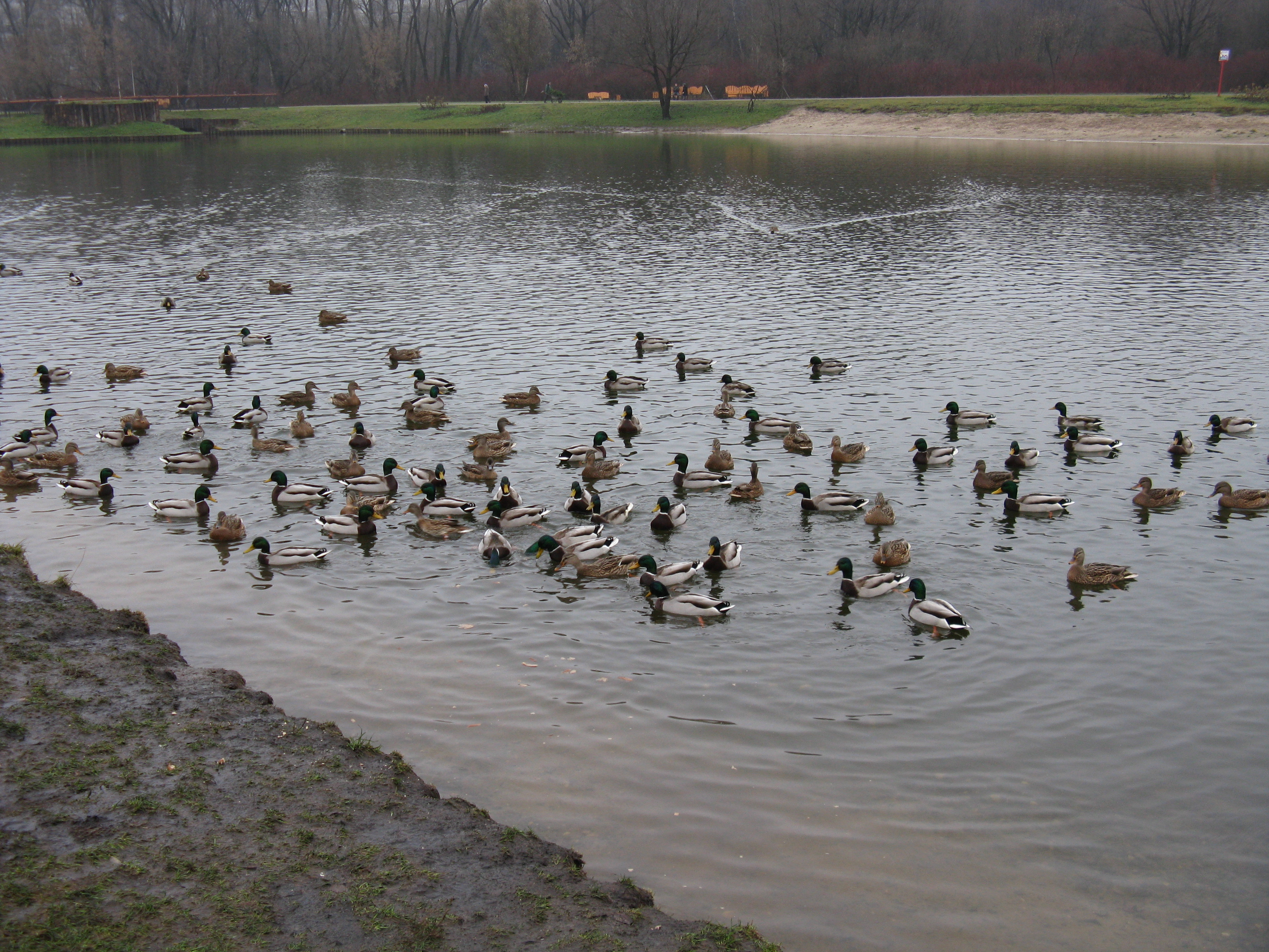 Утки